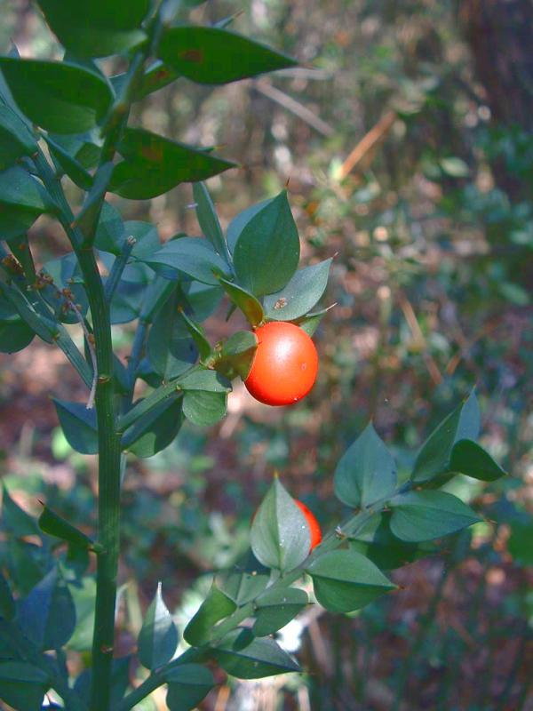 Ruscus aculeatus, Fragon (petit houx), photo J.F. Gaffard, Talmont-Saint-Hilaire, juillet 2004